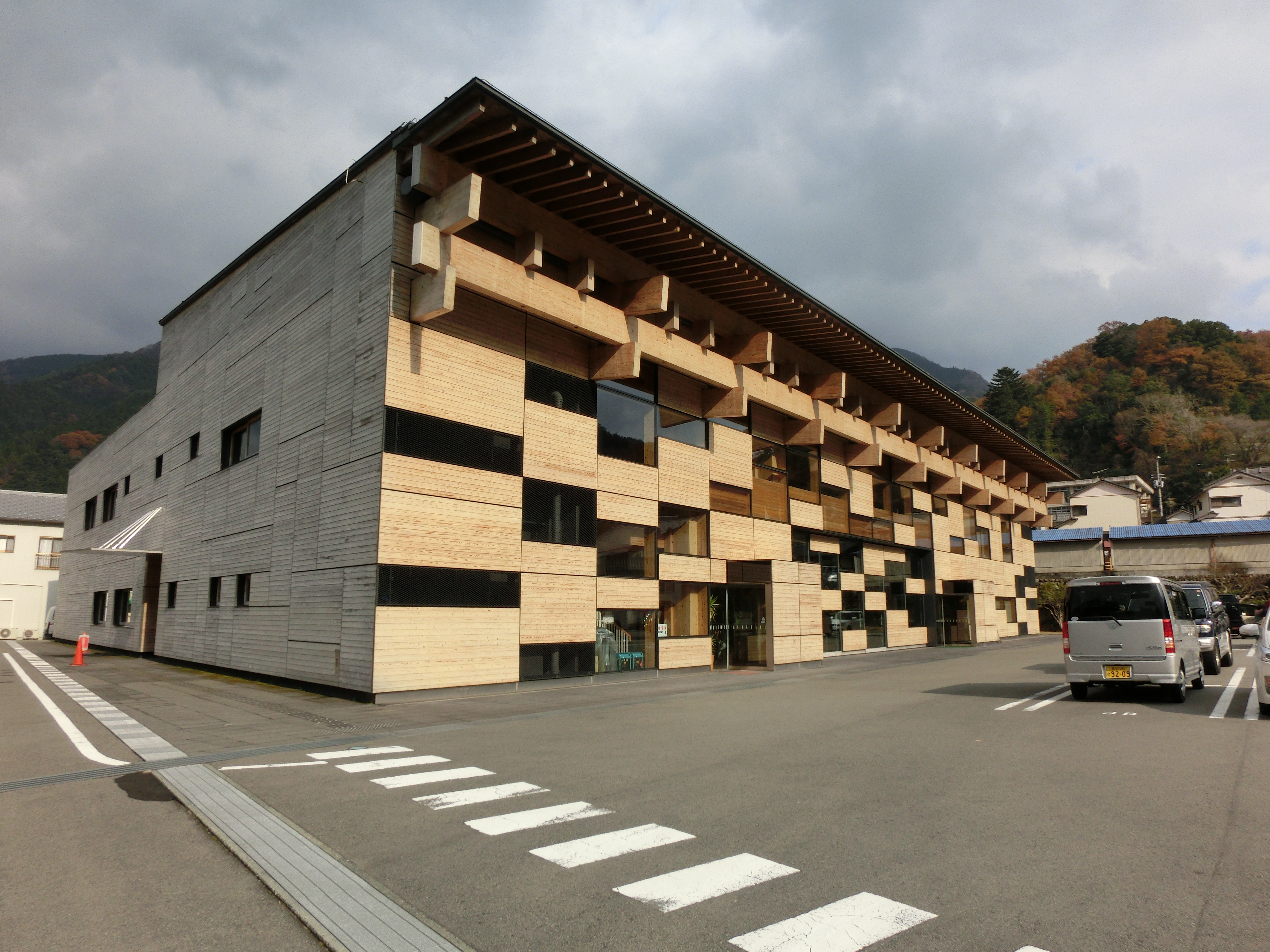 梼原町役場